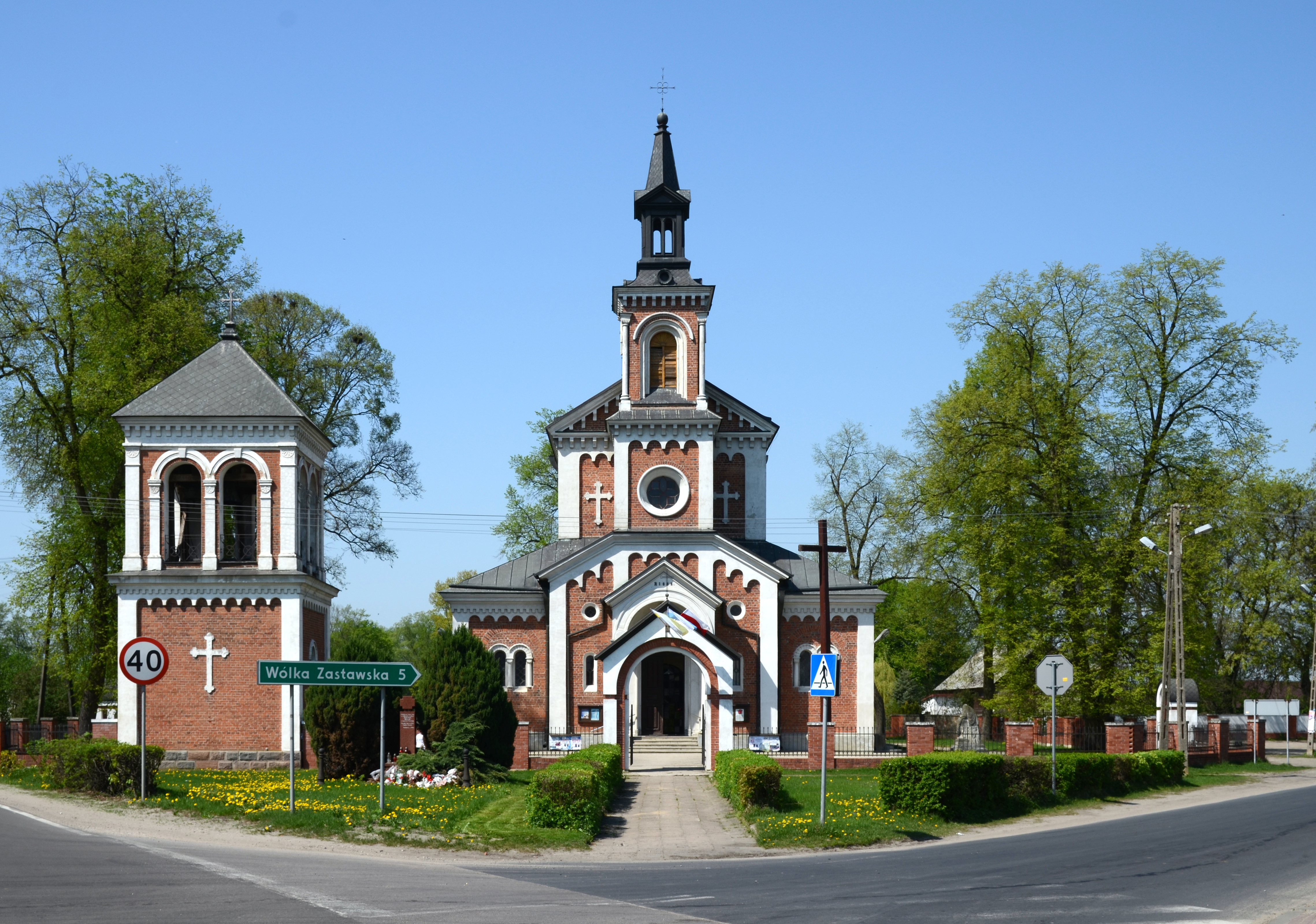 Tuchowicz - kościół parafialny p.w. św. Marii Magdaleny, 1888 (zabytek nr 347/83 z 31.12.1983).